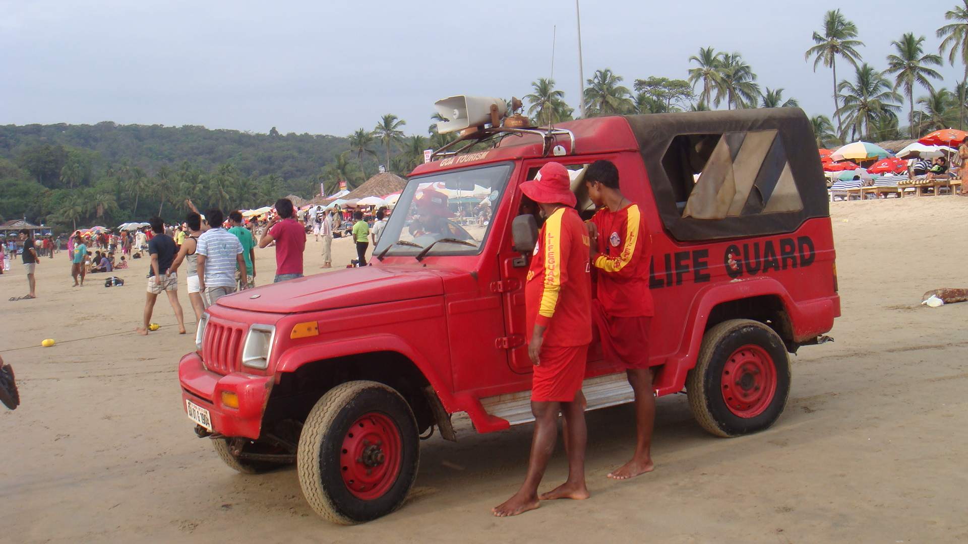 ഗോവ ബീച്ചുകളിലെ ലൈഫ് ഗാർഡുകളും അവരുടെ സന്നാഹങ്ങളും